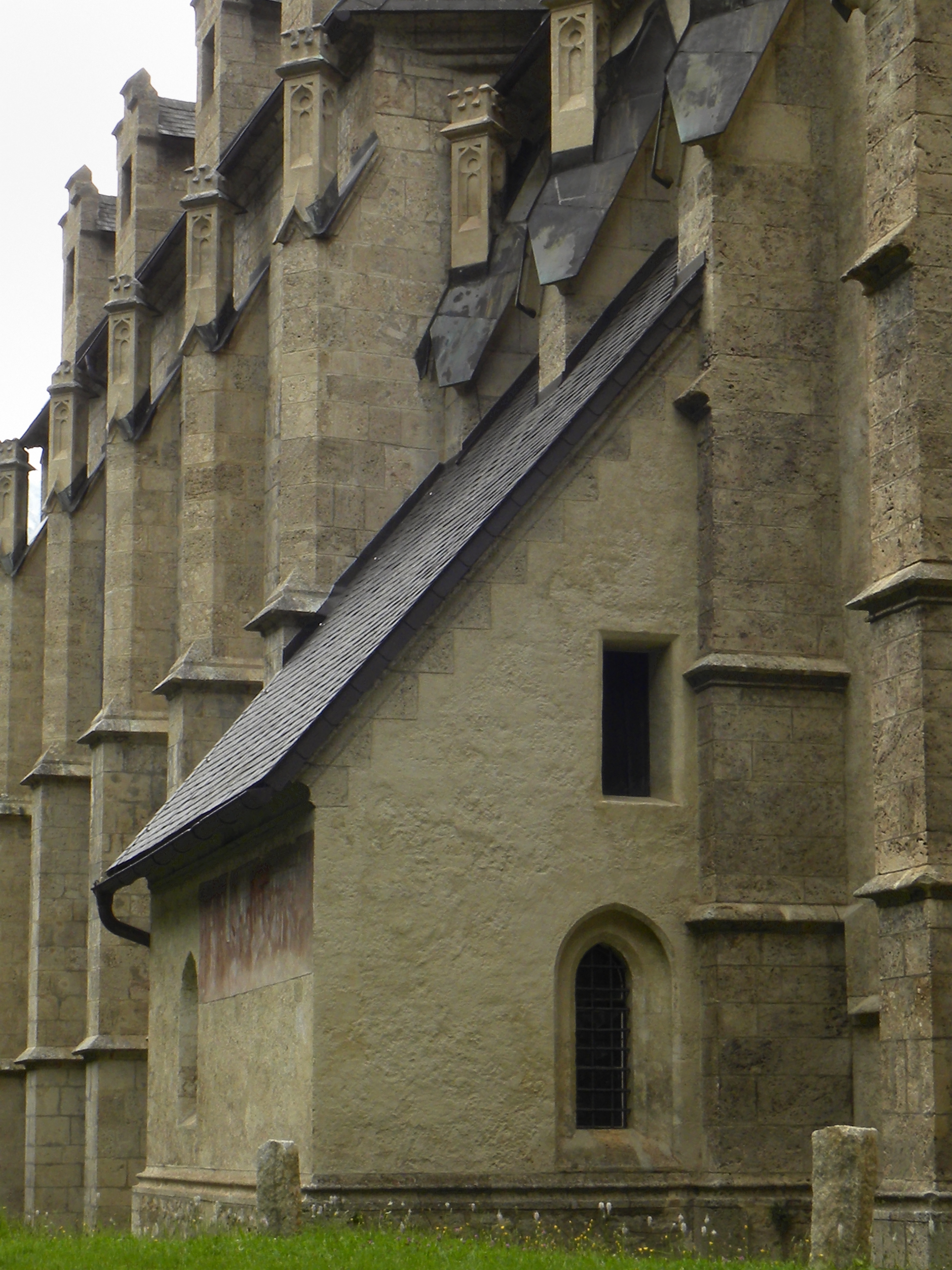 Kirchenfestungsanlage hl. Oswald mit Johanneskapelle und Kapellenbildstock